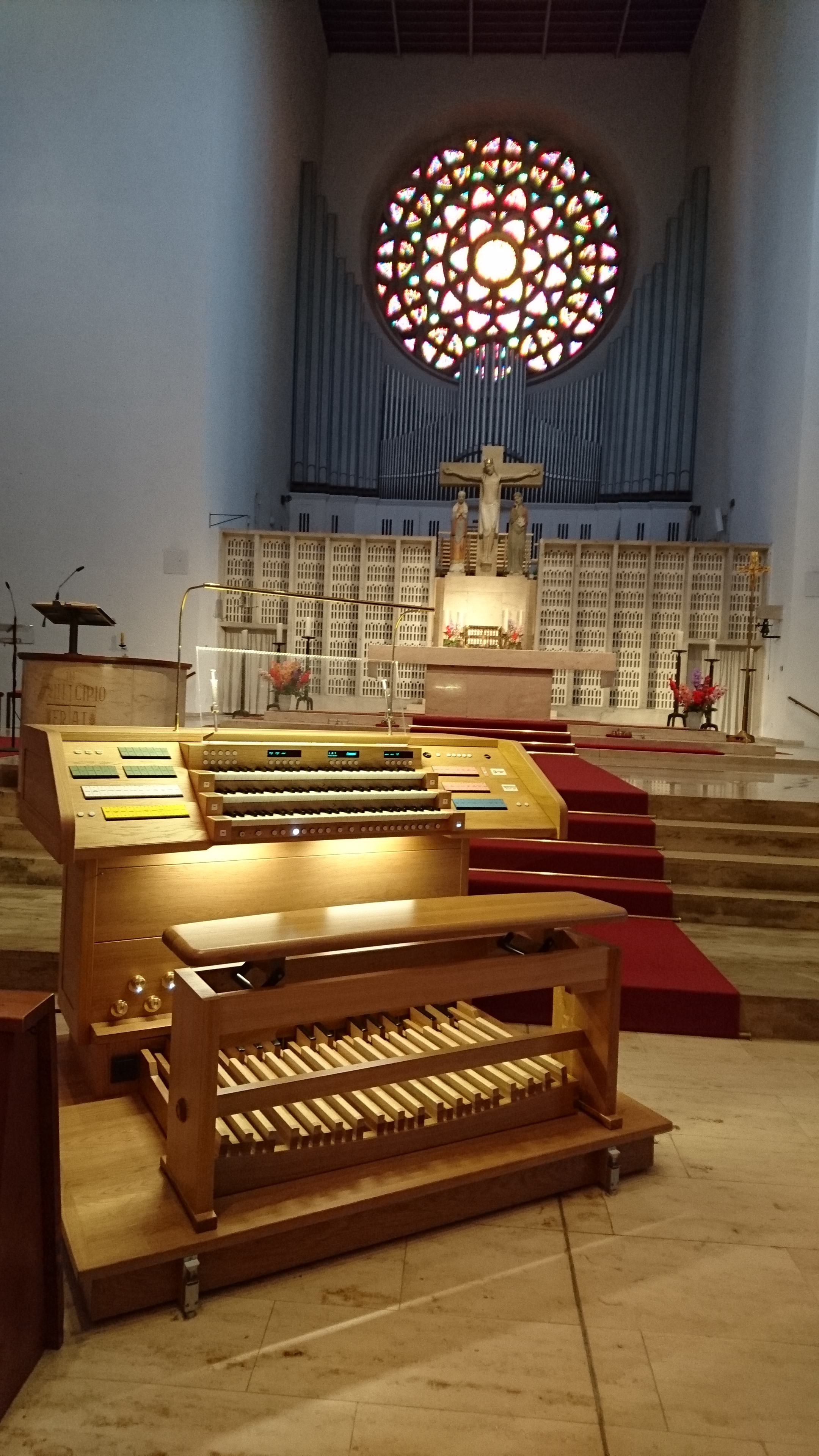 Blick zur Siemannorgel mit dem Spieltisch (2018)